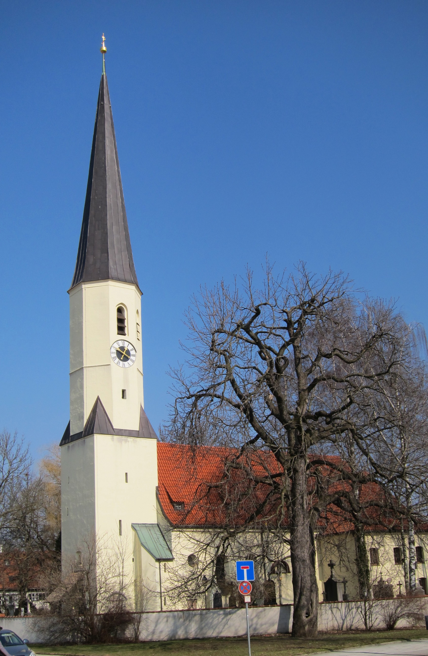 Baumkirchner Straße 45; Kath. Kirche St. Stephan, spätgotische Wandpfeilerkirche, um 1511, im 18. Jh. umgestaltet; mit Ausstattung.